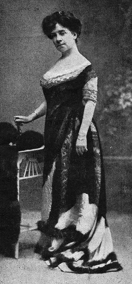 Sofía Casanova, fotografía en Vida Gallega 1919